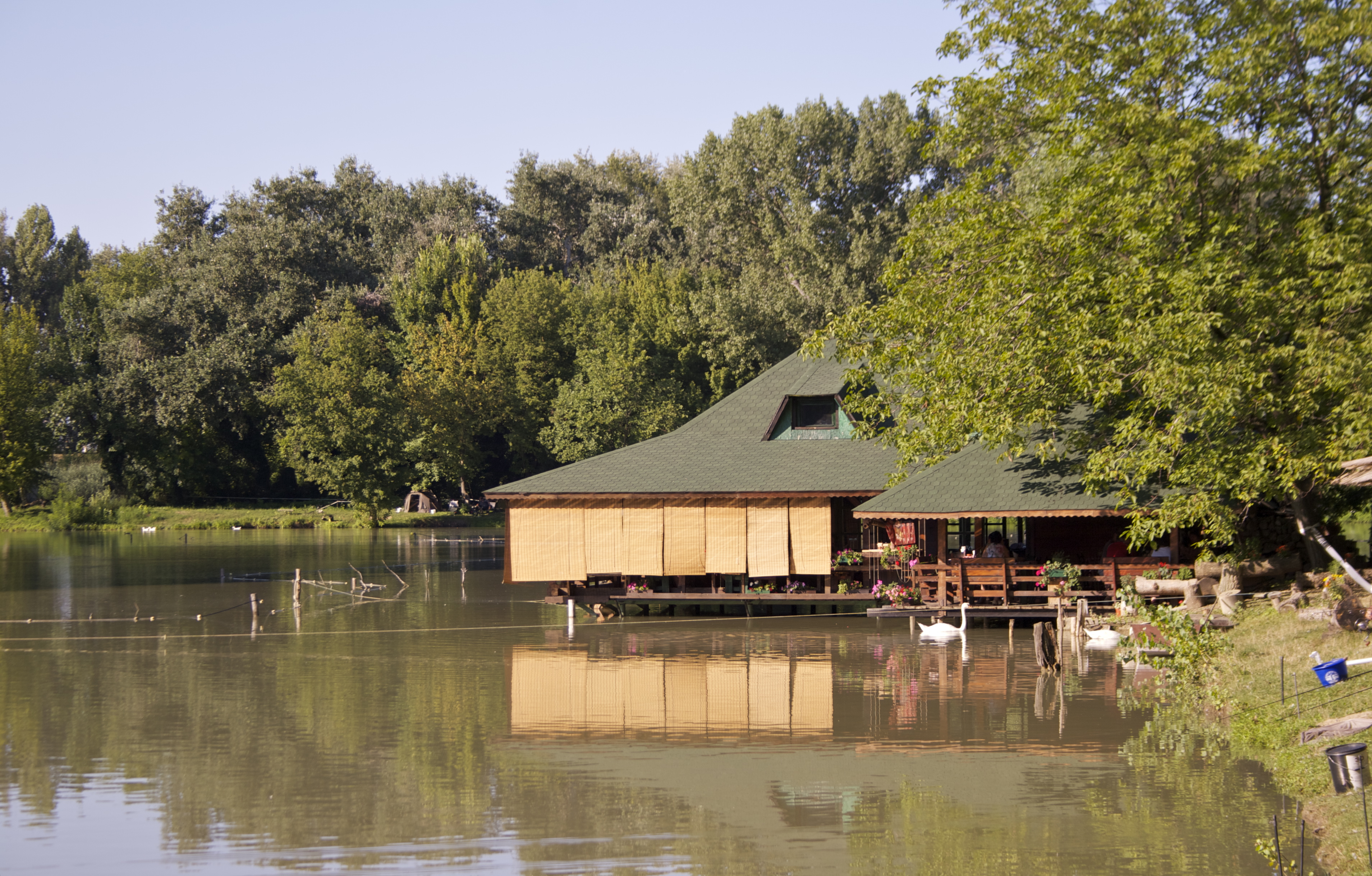 Ада Сафари на Ади Циганлији